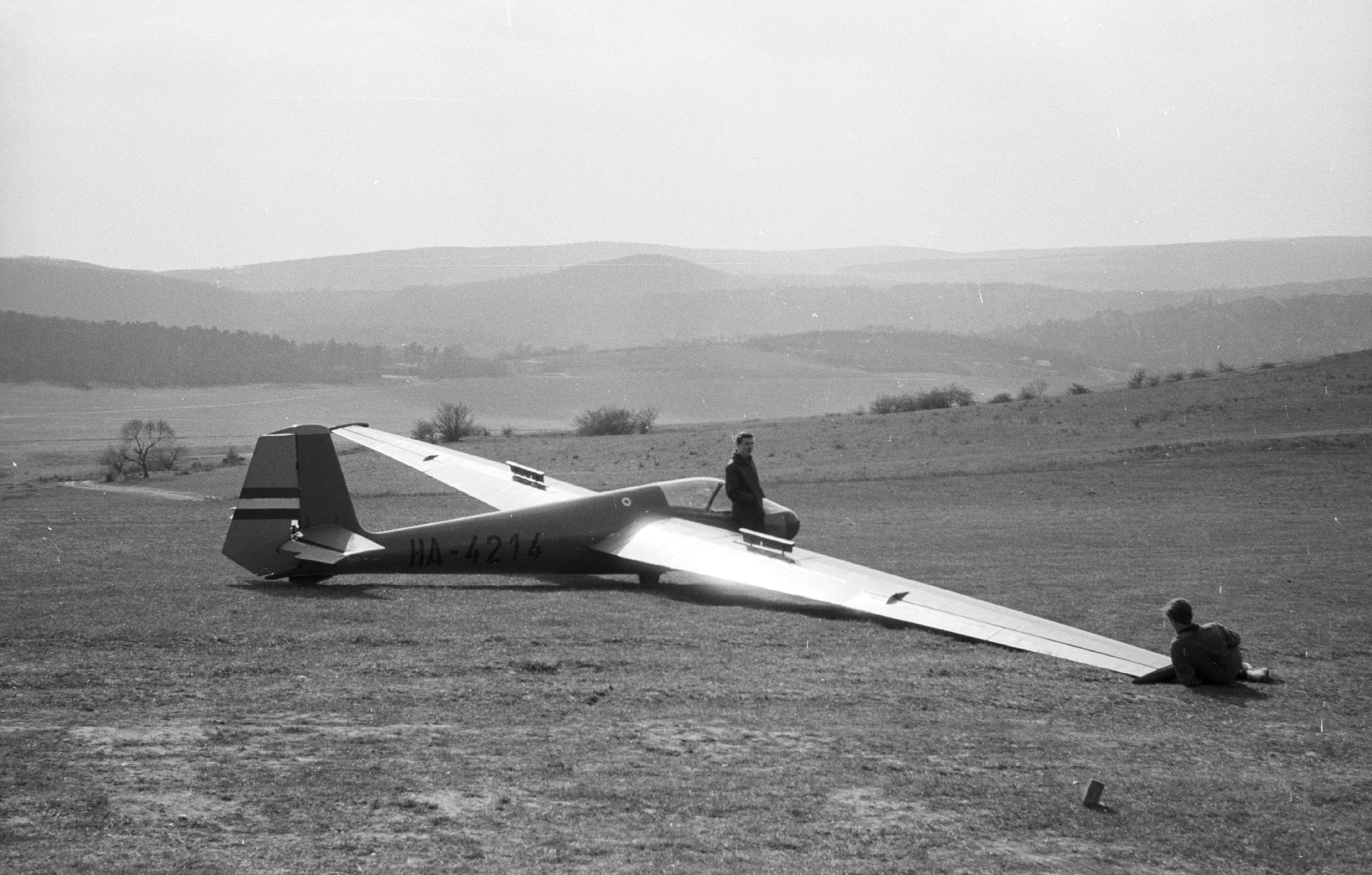 Rubik R-22SV Super Futár C vitorlázó repülőgép. Location: Hungary, Budapest II., Hármashatárhegy Airport Tags: airport, airplane, sailplane, Hungarian brand, Budapest Title: Rubik R-22SV Super Futár C vitorlázó repülőgép.